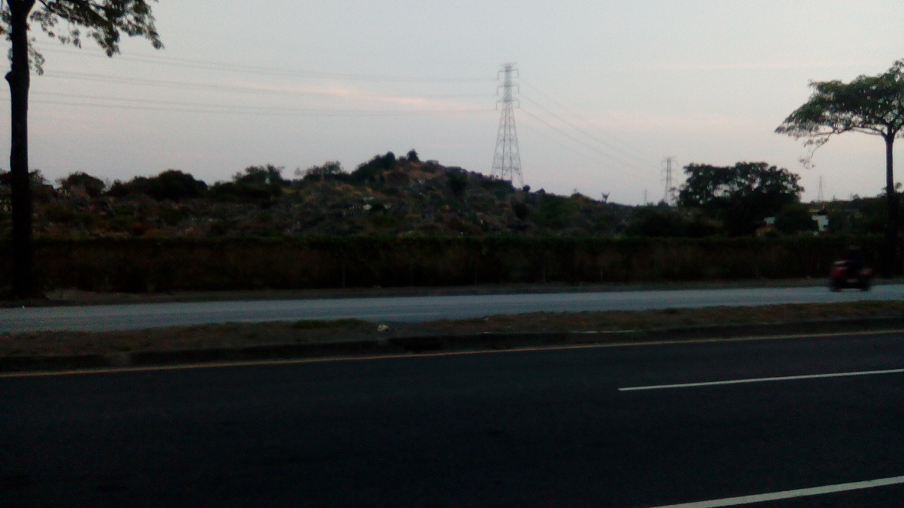 新厝公墓